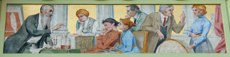 Nástěnná malba Přednáška od Ládi Nováka - Měšťanská beseda v Plzni.